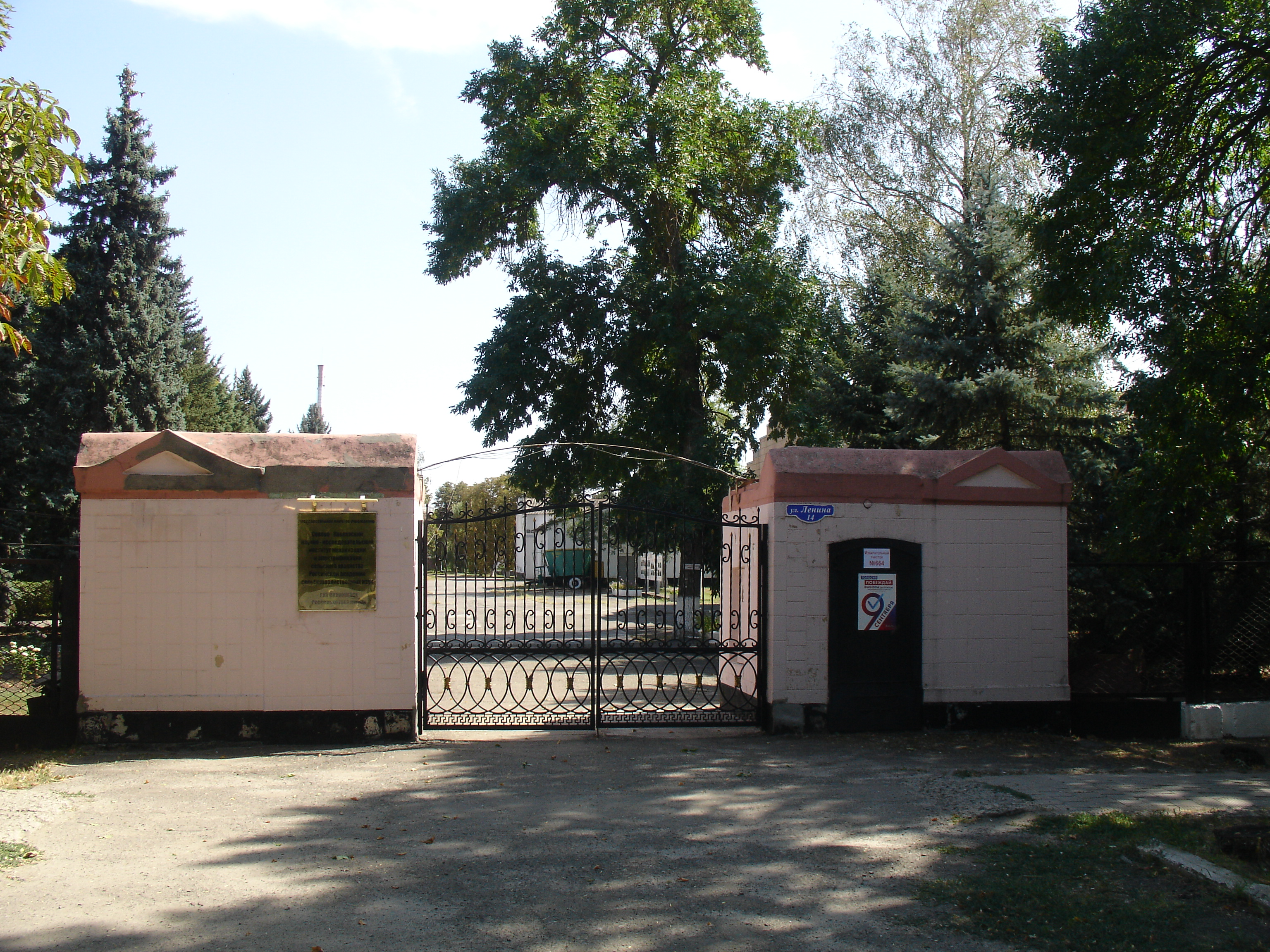 Северо-Кавказский научно-исследовательский институт механизации и электрификации сельского хозяйства Российской академии сельскохозяйственных наук. ул. Ленина, г. Зерноград, Ростовская обл., Россия.